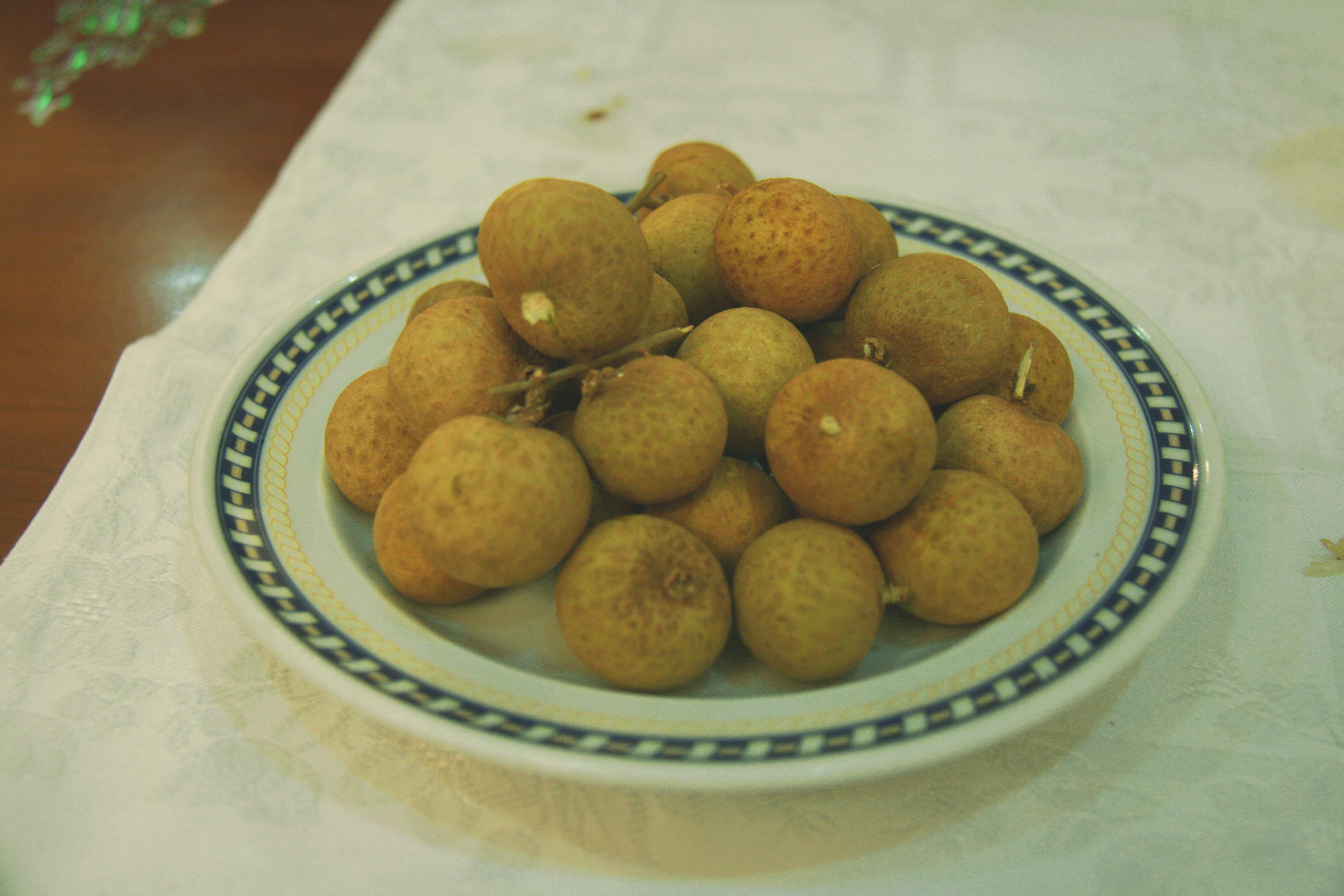 Lichis